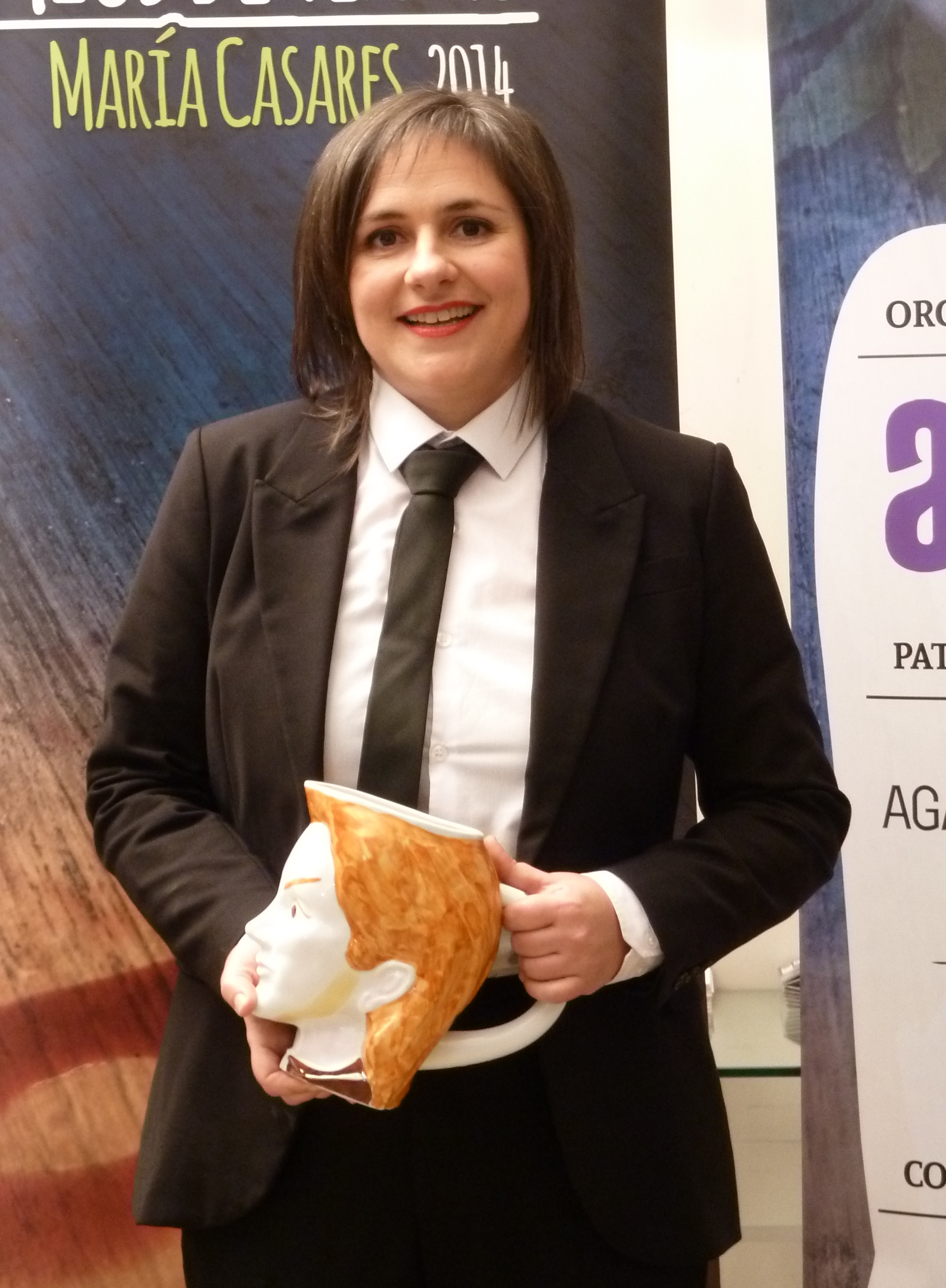 Patricia de Lorenzo na gala dos premios María Casares 2014.